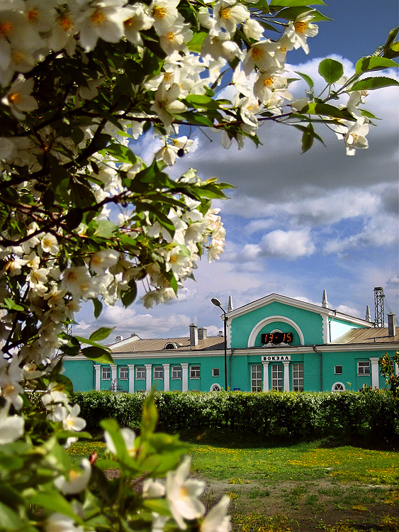 Железнодорожная станция, г. Татарск Новосибирской обл.